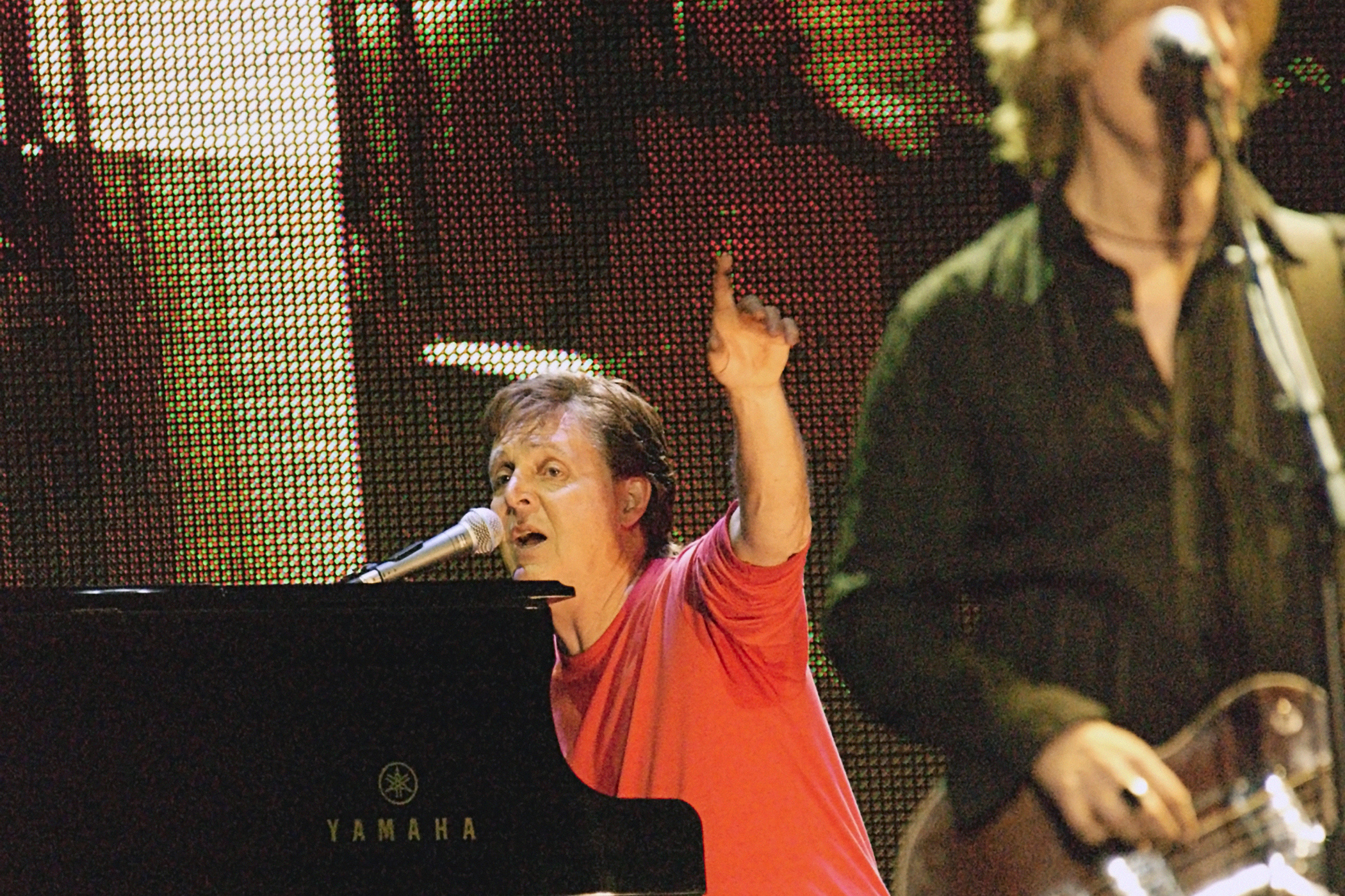 МОСКВА, КРАСНАЯ ПЛОЩАДЬ. Концерт Пола Маккартни.